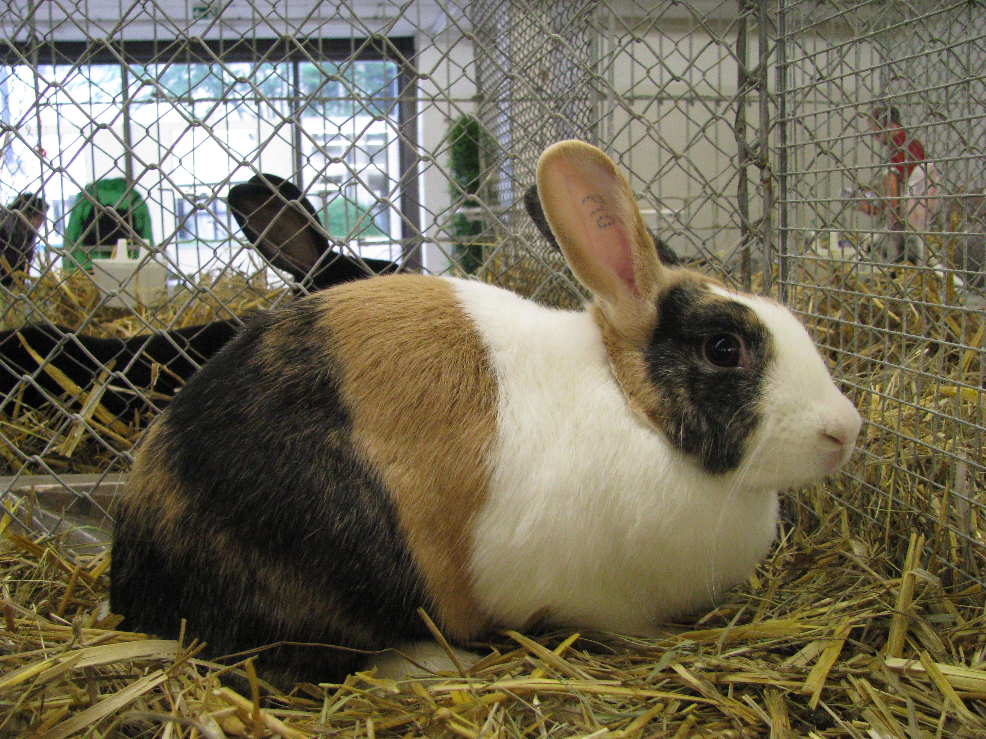 Holländerkaninchen im Farbschlag Japaner